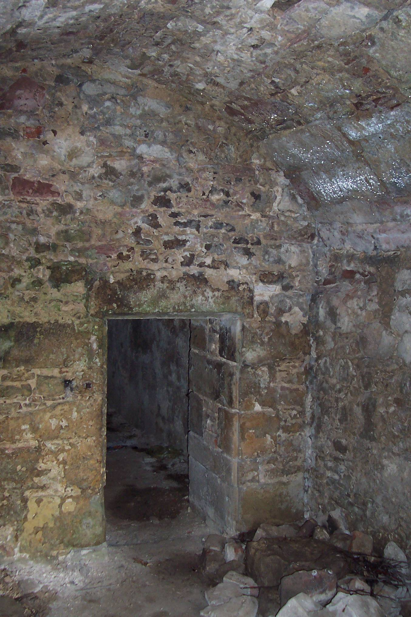 Corvinius-Keller, Raum 1